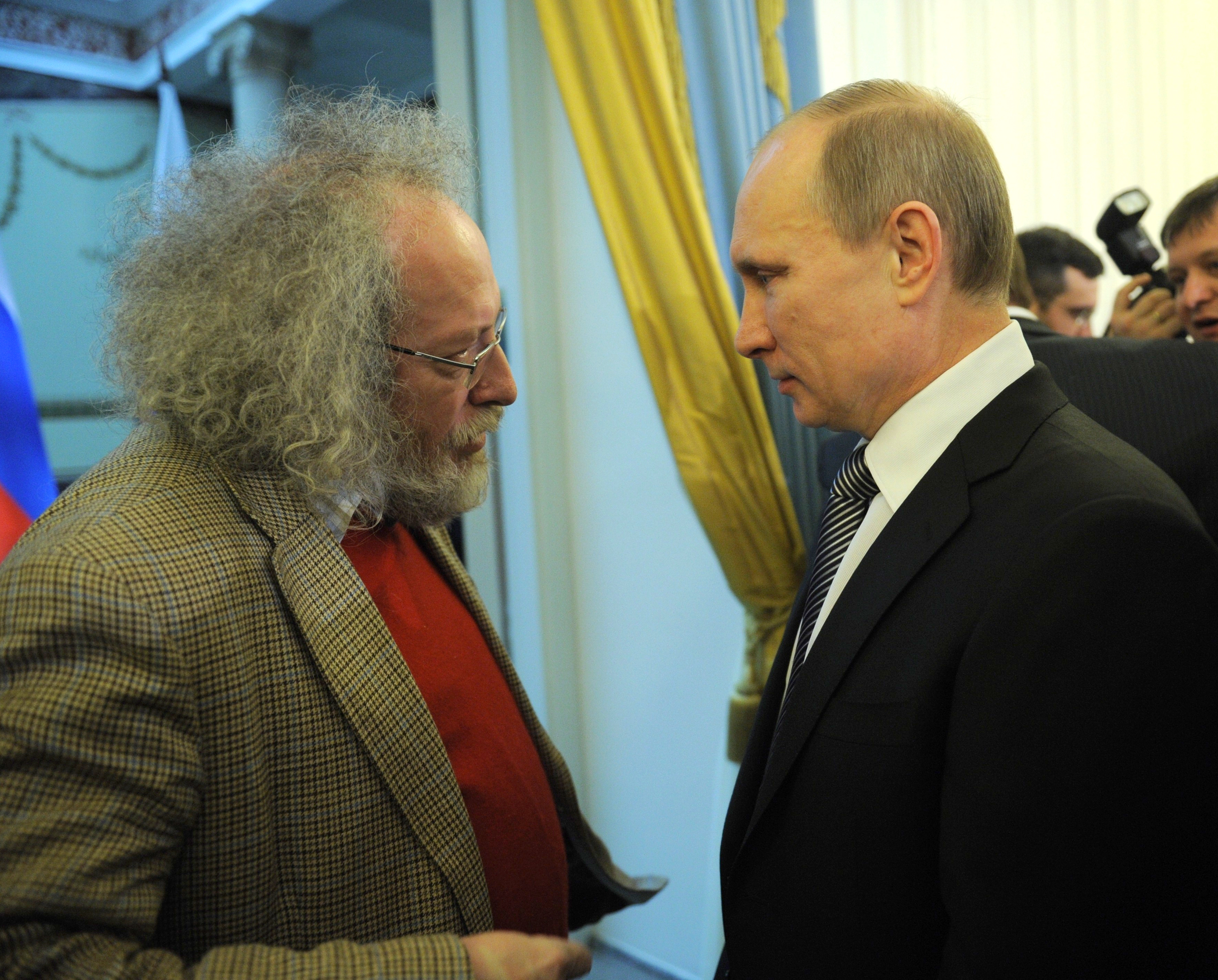 Председатель Правительства Российской Федерации В. В. Путин и главный редактор радиостанции «Эхо Москвы» А. А. Венедиктов